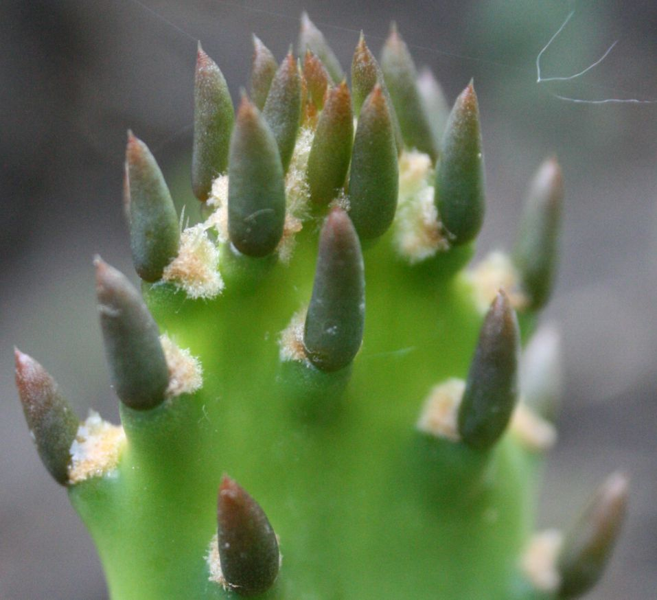 Opuntia humifusa fiatal leveles hajtása, a levelek tövében fejlődő areolákkal